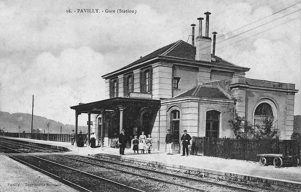 La gare de Pavilly-Station, avec le bâtiment voyageurs du à l'architecte William Tite.